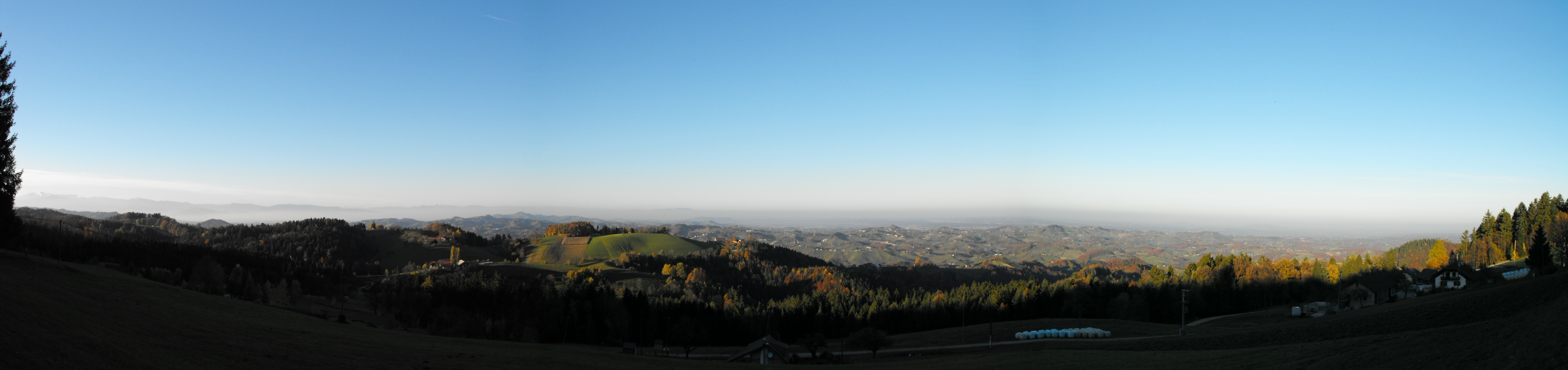 Zg. Boč - panorama